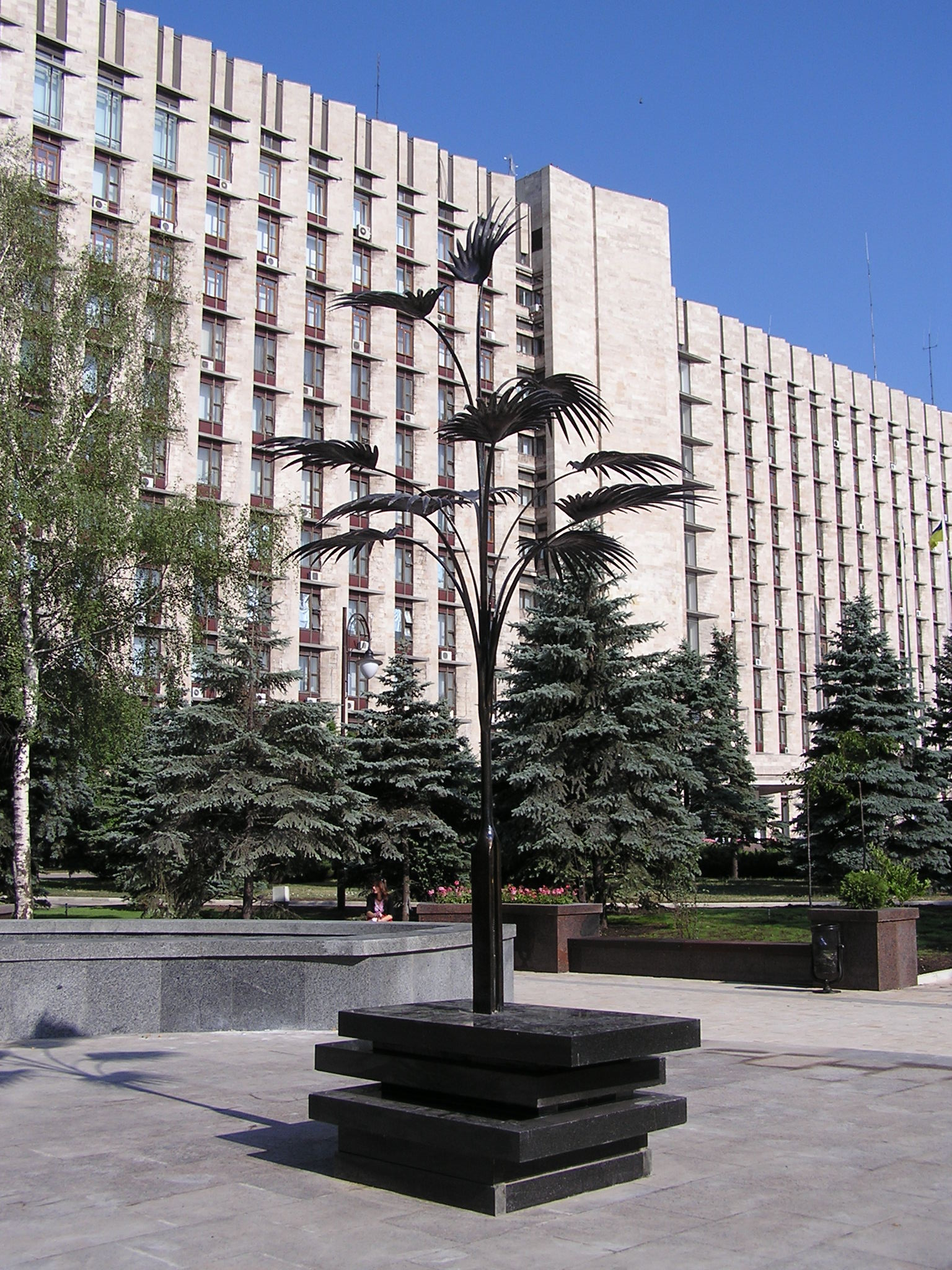 Пальма Мерцалова у облгосадминистрации